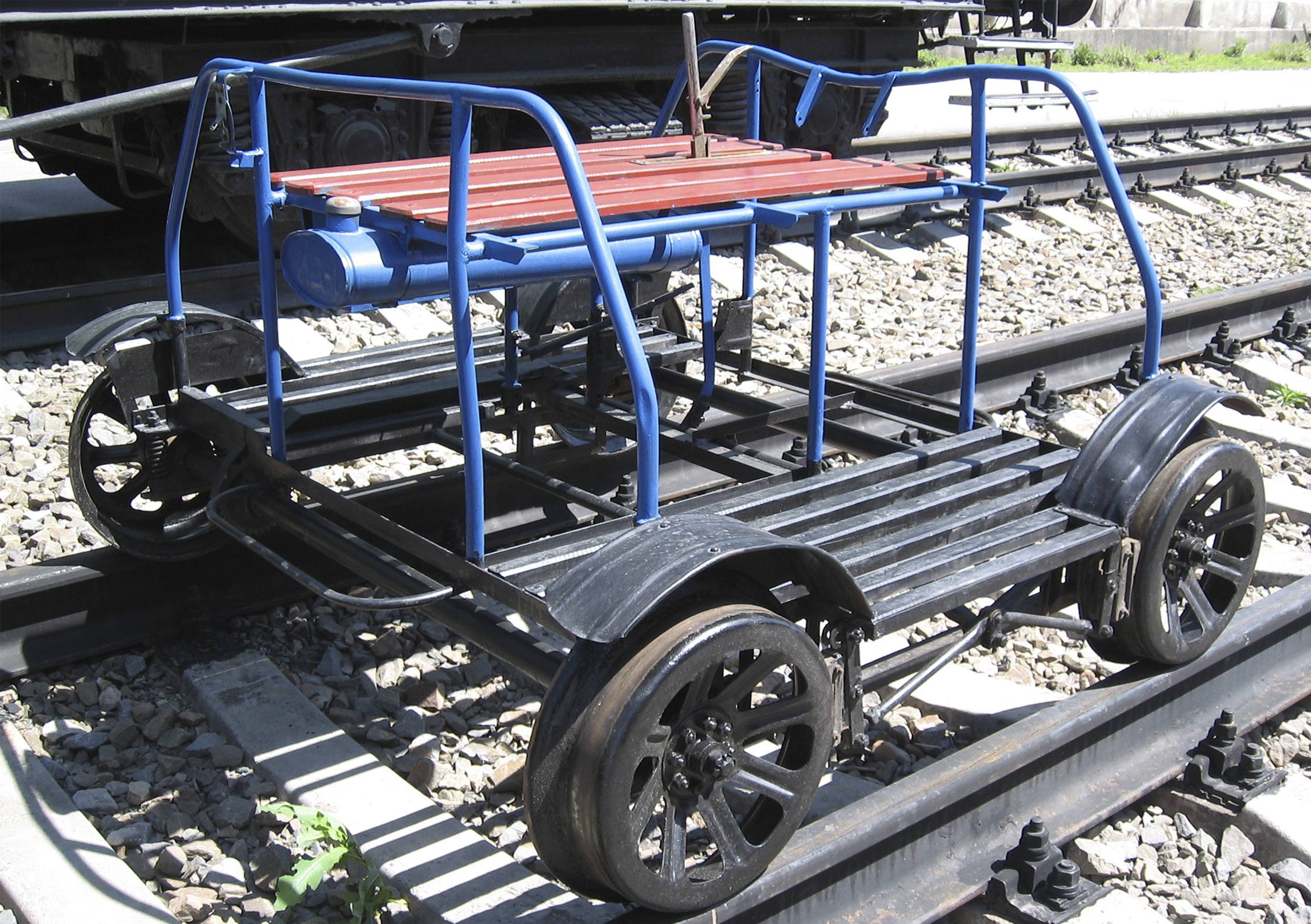 Дрезина построена Приокским машиностроительным заводом в 1955 году